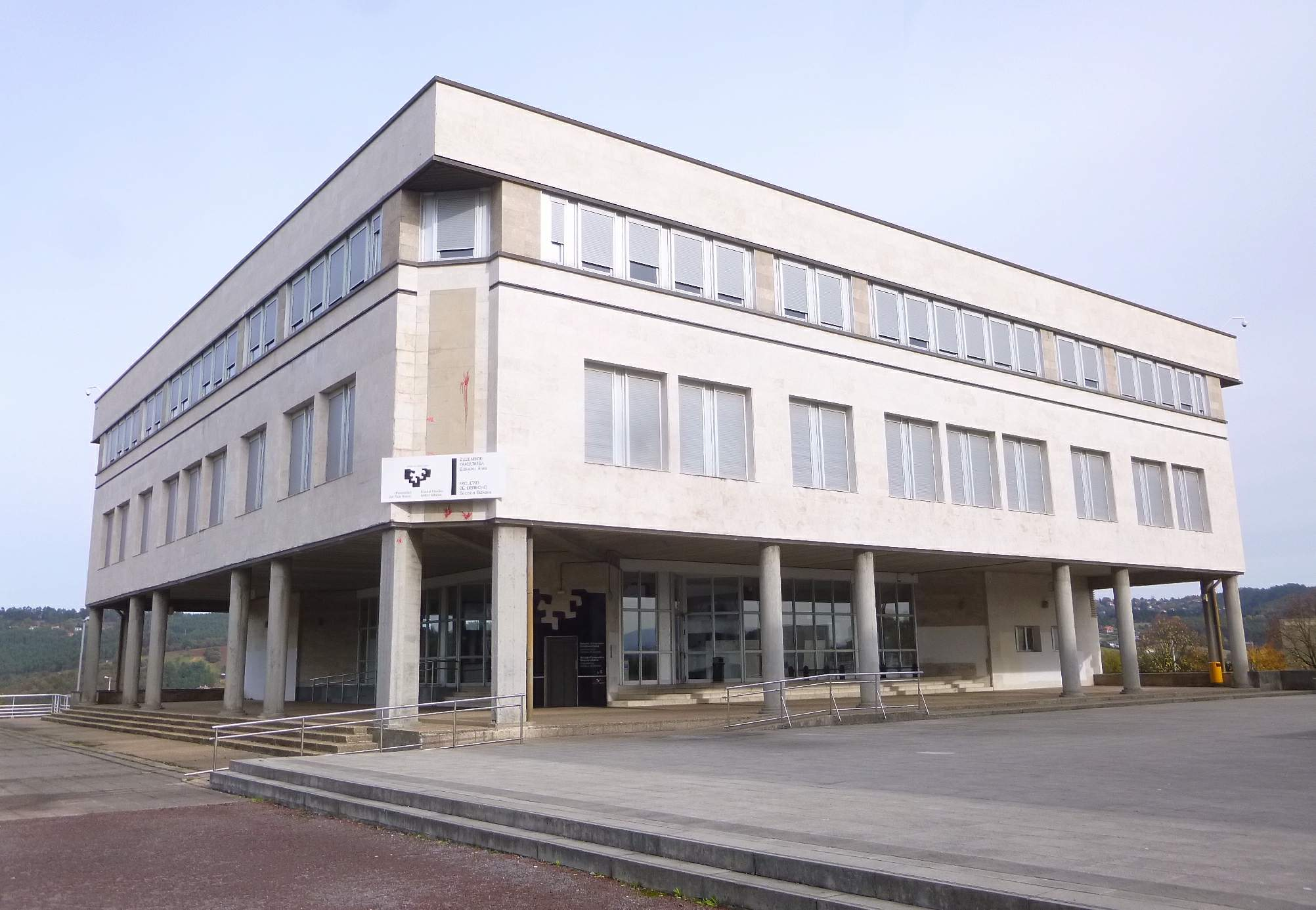 Lejona - Campus de Bizkaia de la UPV-EHU - Facultad de Derecho (Sección Bizkaia)